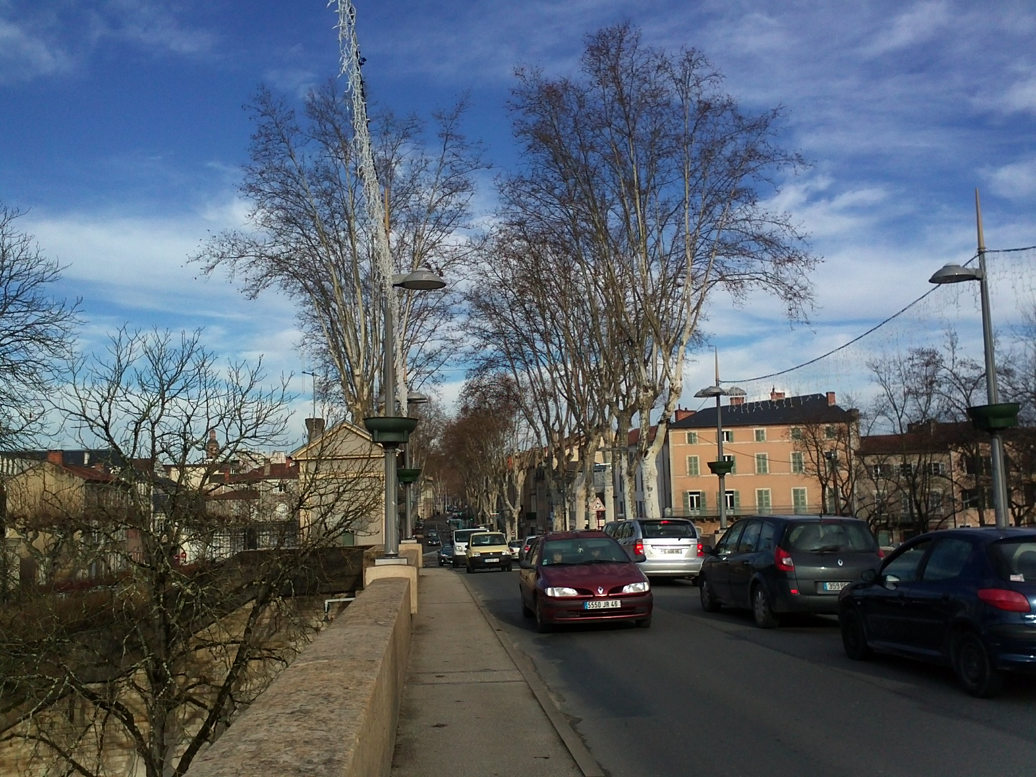 Le pont Louis Philippe à Cahors, vers la direction du centre ville